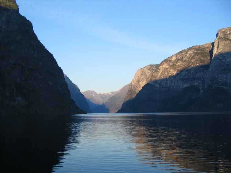 Fjord en Norvège vue du bateau reliant Flam à Bergen